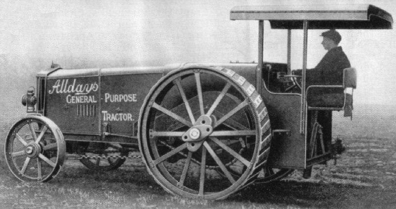 Alldays General Purpose tractor (1917-18). Built by Alldays & Onions, it had a 25-30 HP four cylinder engine burning gasolene or paraffin. It was was an expensive vehicle, with front and rear springs, 3 speeds and reverse gears, rear wheel and transmission brake, and a canopy. Few were made.